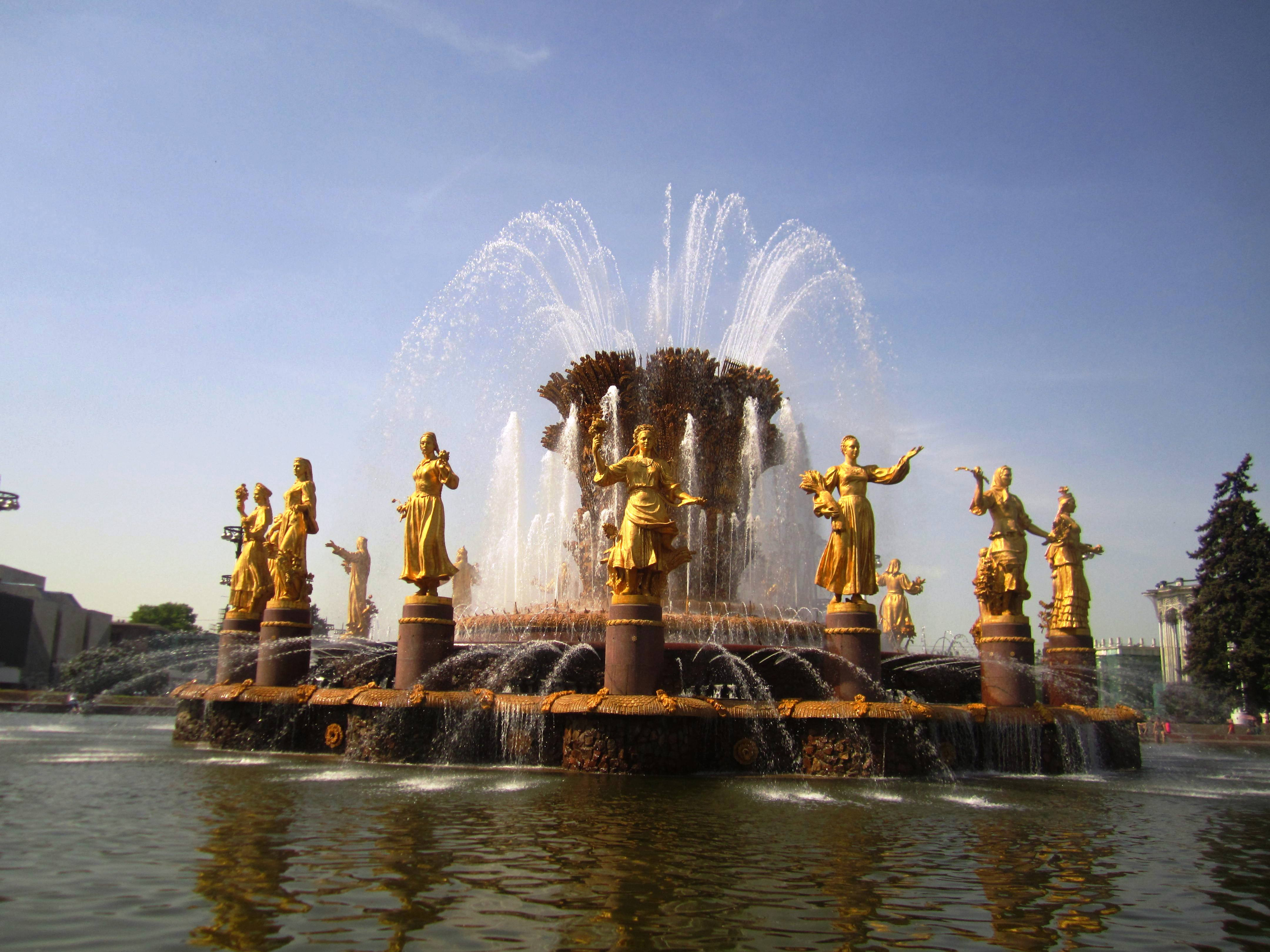 Фонтан Дружба народов: просп. Мира, на территории ВВЦ, Останкинский, Северо-Восточный округ, Москва